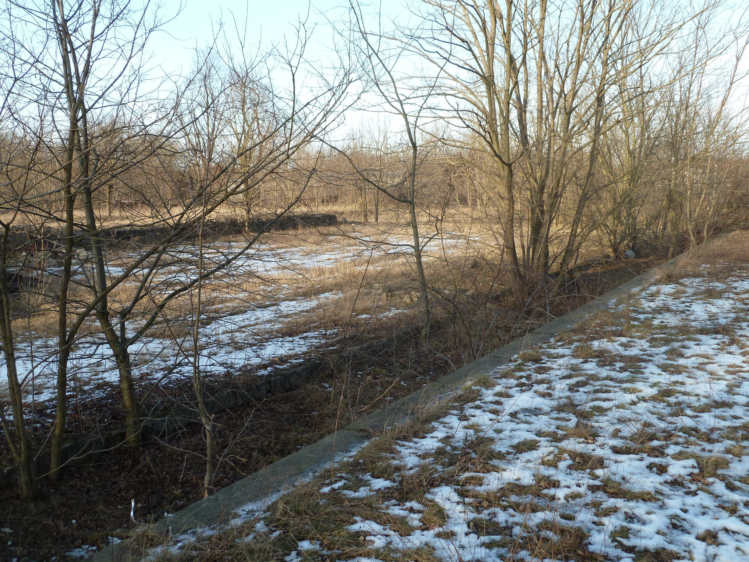 Jüterbog Miltärbahnhof, ehemalige Bahnsteige.